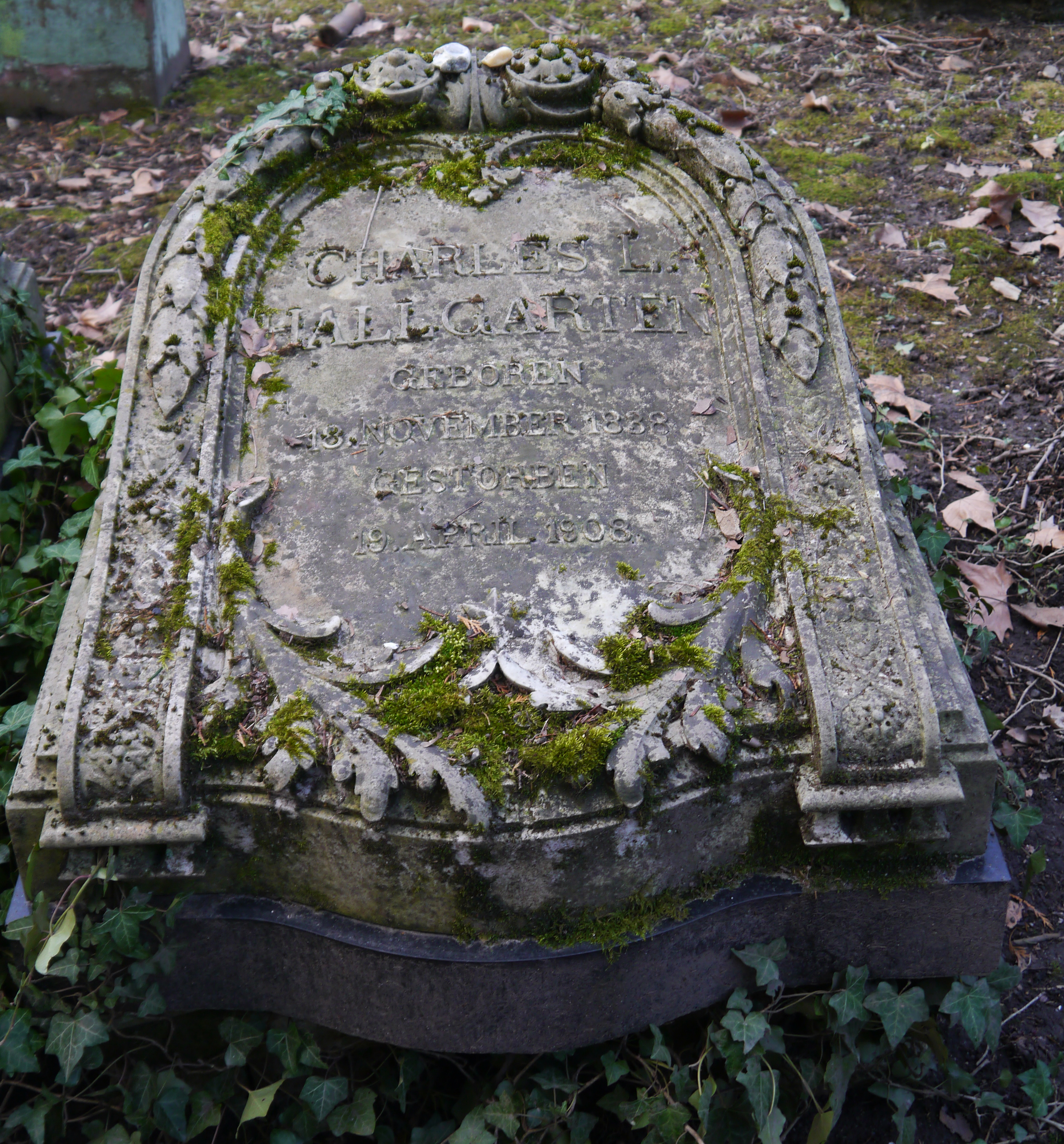 (Alter) Jüdischer Friedhof an der Rat-Beil-Strasse in Ffm. Grabstein von Charles Hallgarten.